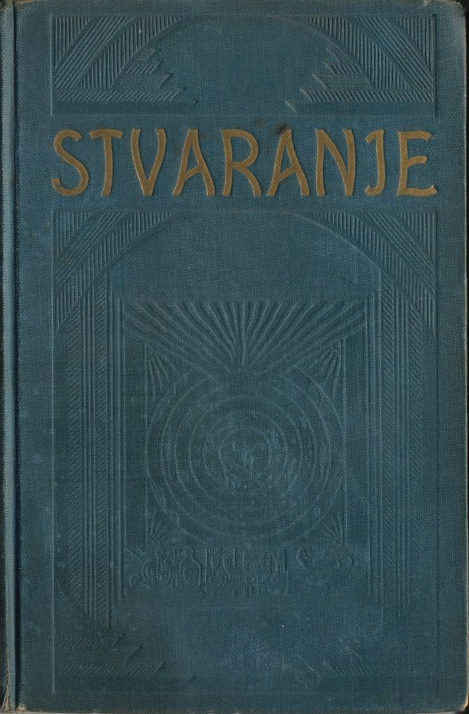 Książka Stworzenie, edycja chorwacka, 1927